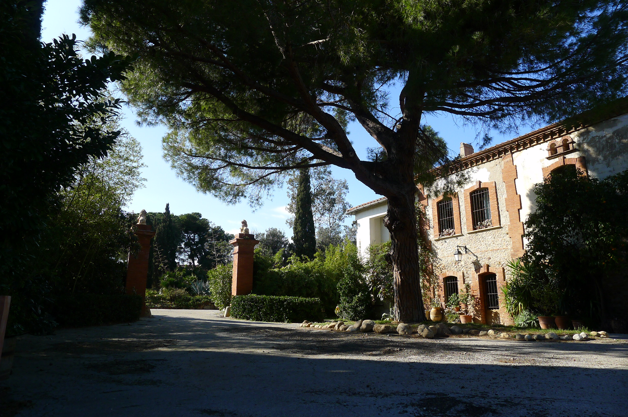 Ancien mas du XVIIème siècle